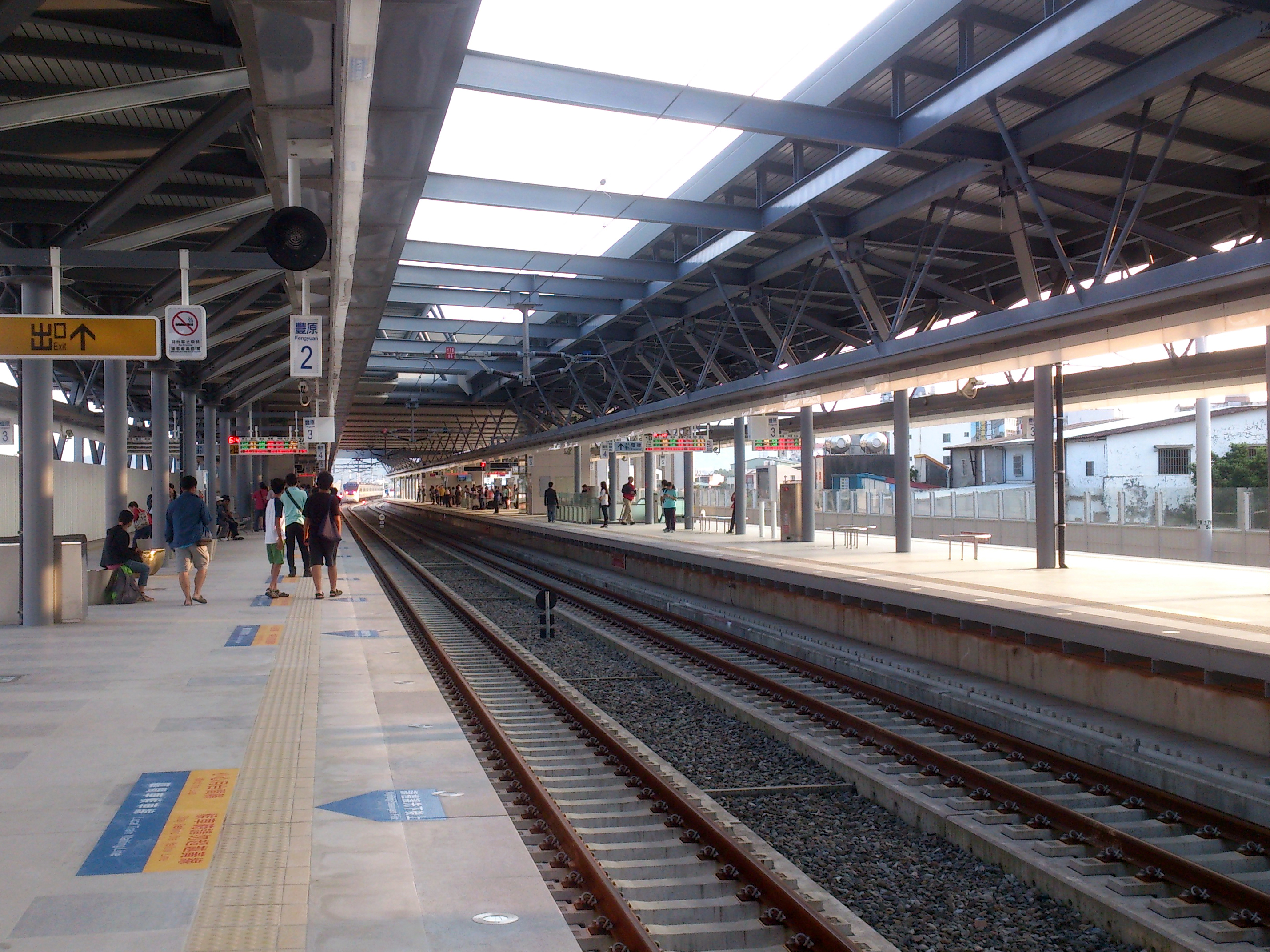 豐原車站月台層